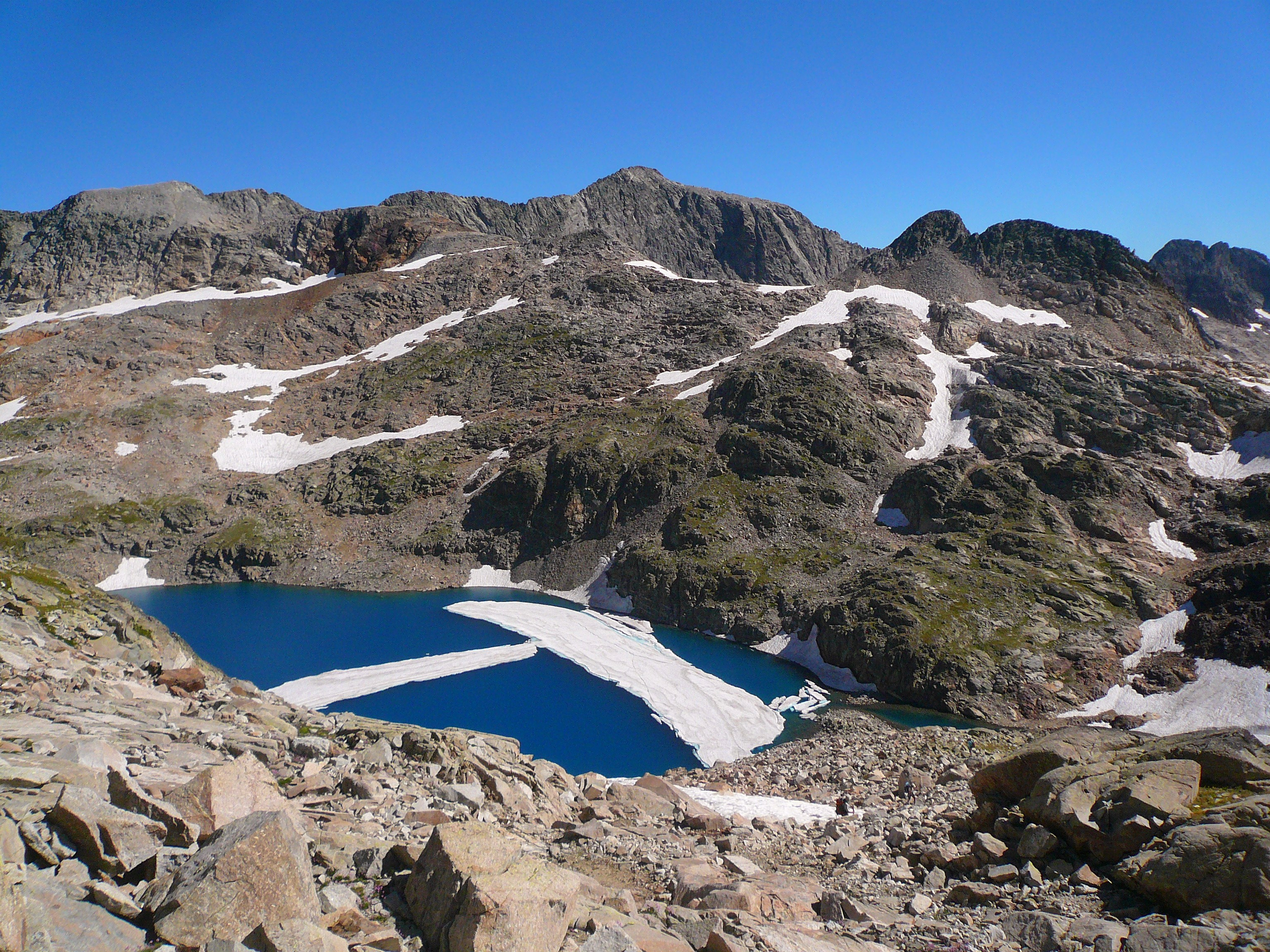 Ibón Lliterola near Mt. Perdiguero